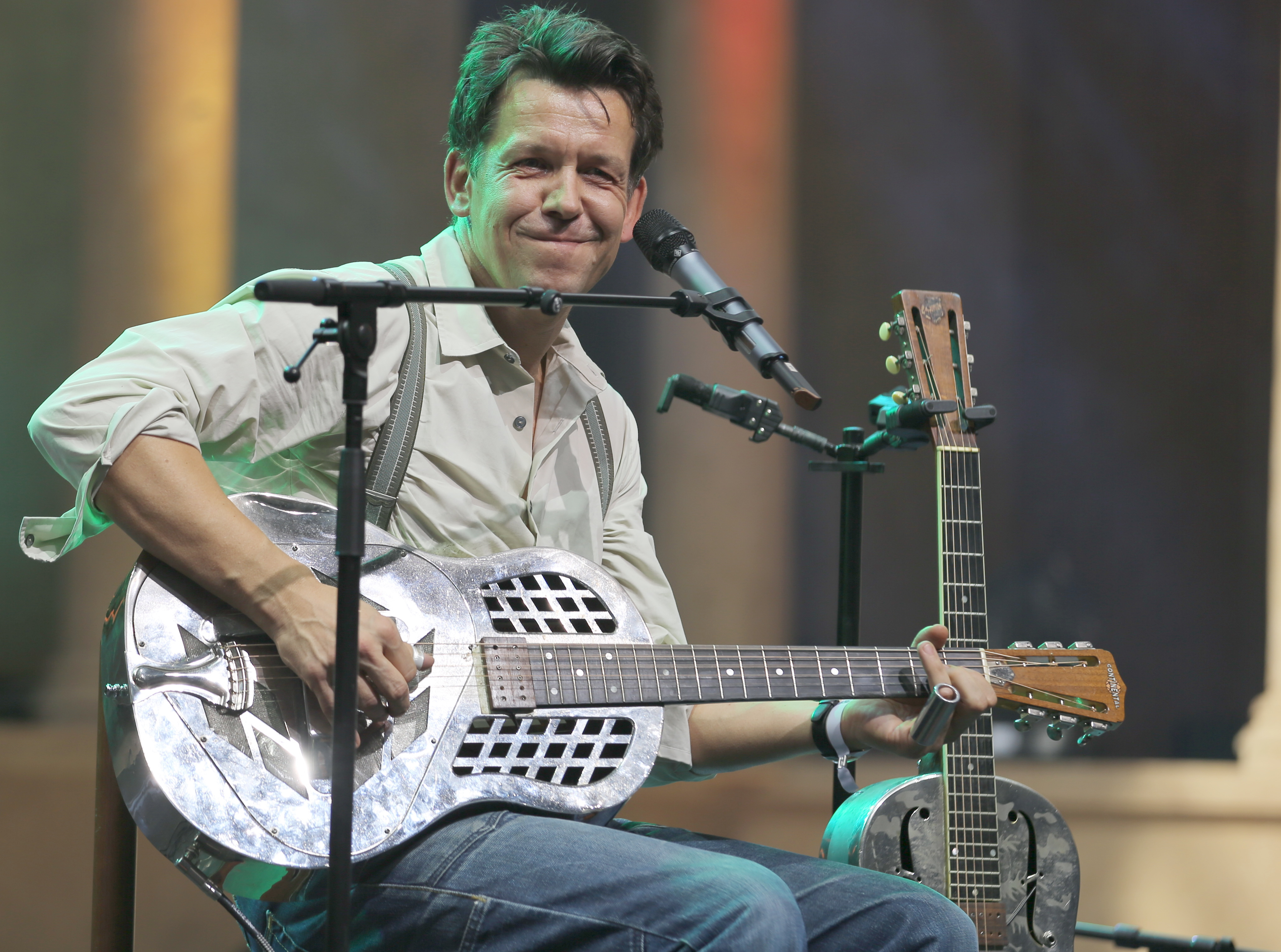 Black Patti auf dem Heimatsound Festival 2016 in Oberammergau - Peter Krause aka "Peter Crow C." mit Continental Resonatorgitarre